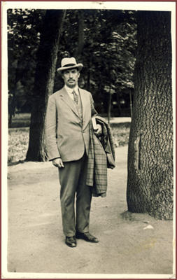 Hans Pöhl.